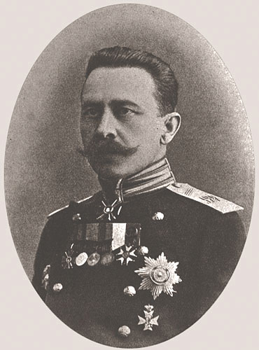 генерал Клембовский, Владислав Наполеонович